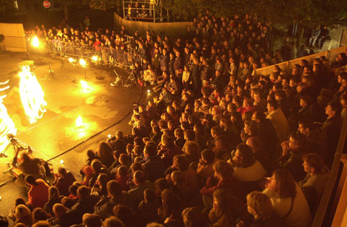 Spectacle de théatre de rue - Plage des six pompes